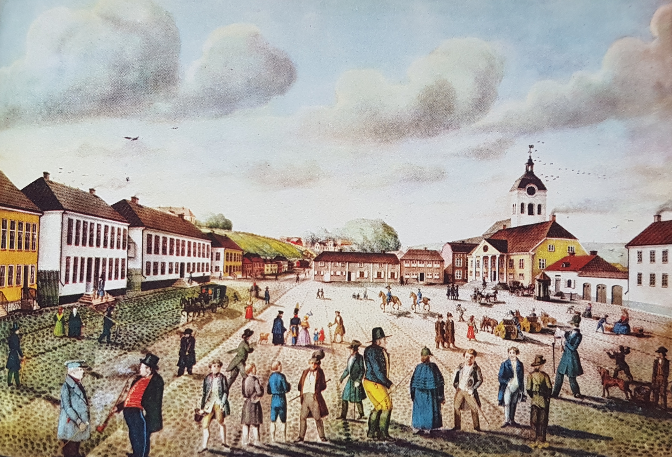 Växjö torg målat av J P Pettersson, avfotograferad bild från Allhems Svenskt konstnärslexikon.